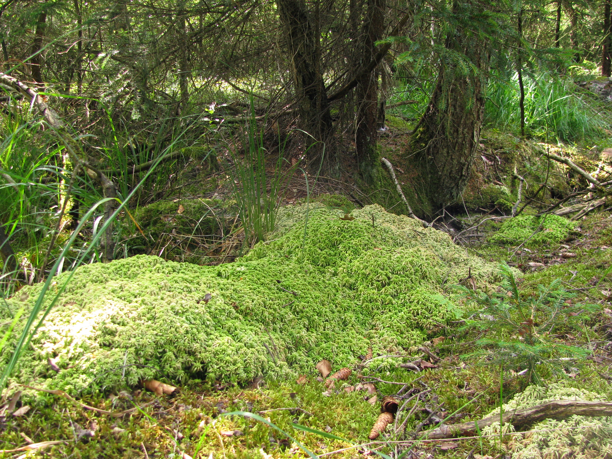 NSG Wildmoos